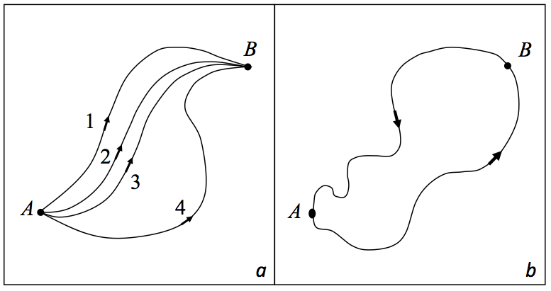 Eremu kontserbakorretako eskema.